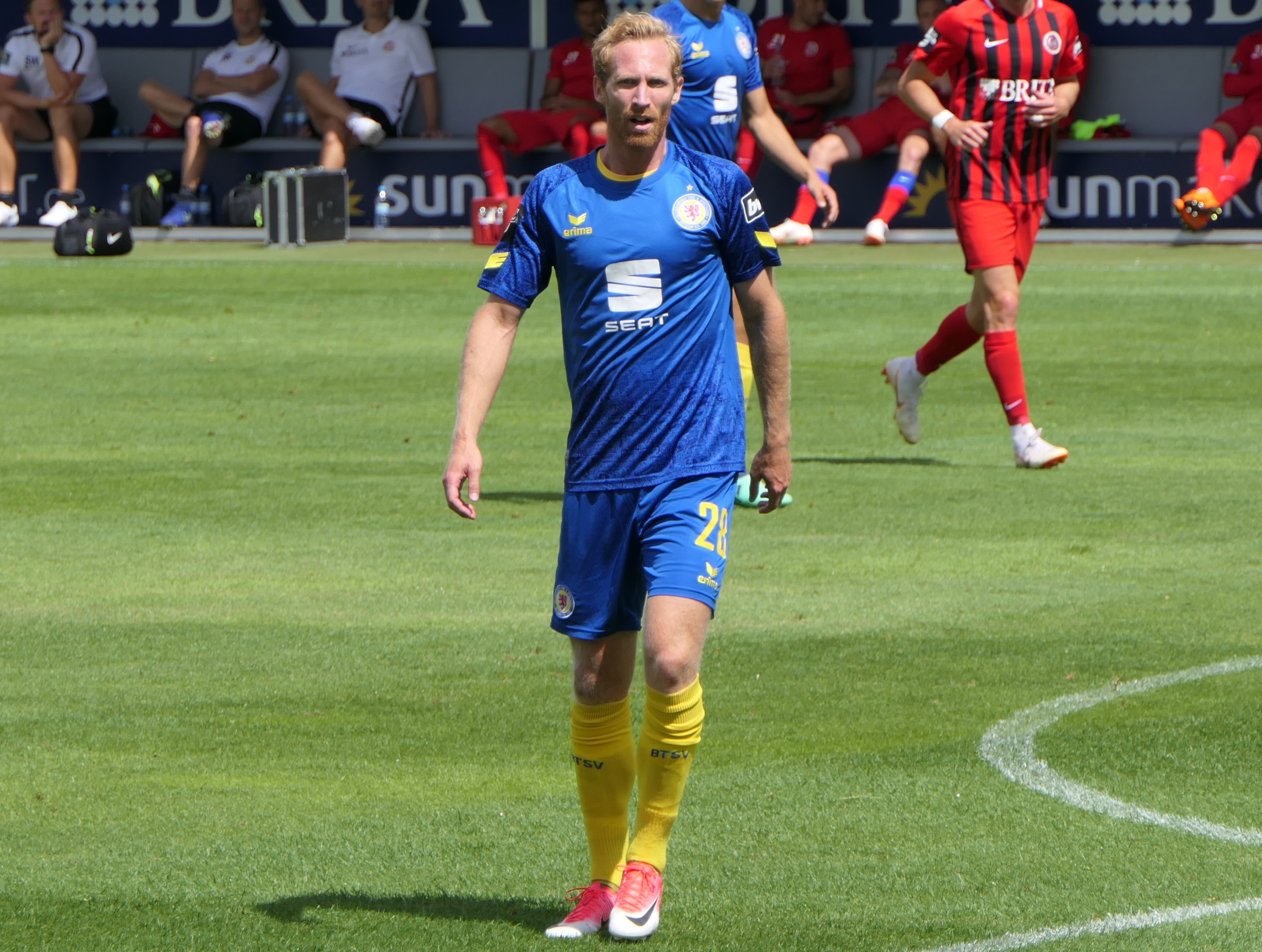 Der Fussballprofi Jonas Thorsen im Trikot von Eintracht Braunschweig beim Auswärtsspiel beim SV Wehen Wiesbaden am 11.08.2018.